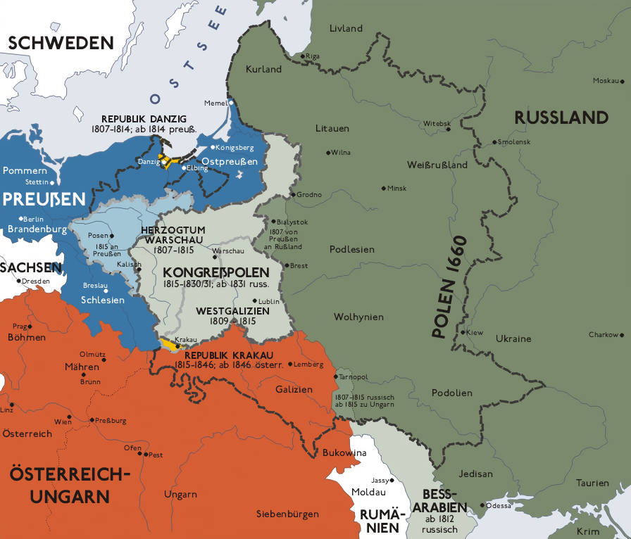 Herzogtum Warschau (Duchy of Warsaw) und Kongresspolen (Congress Poland)